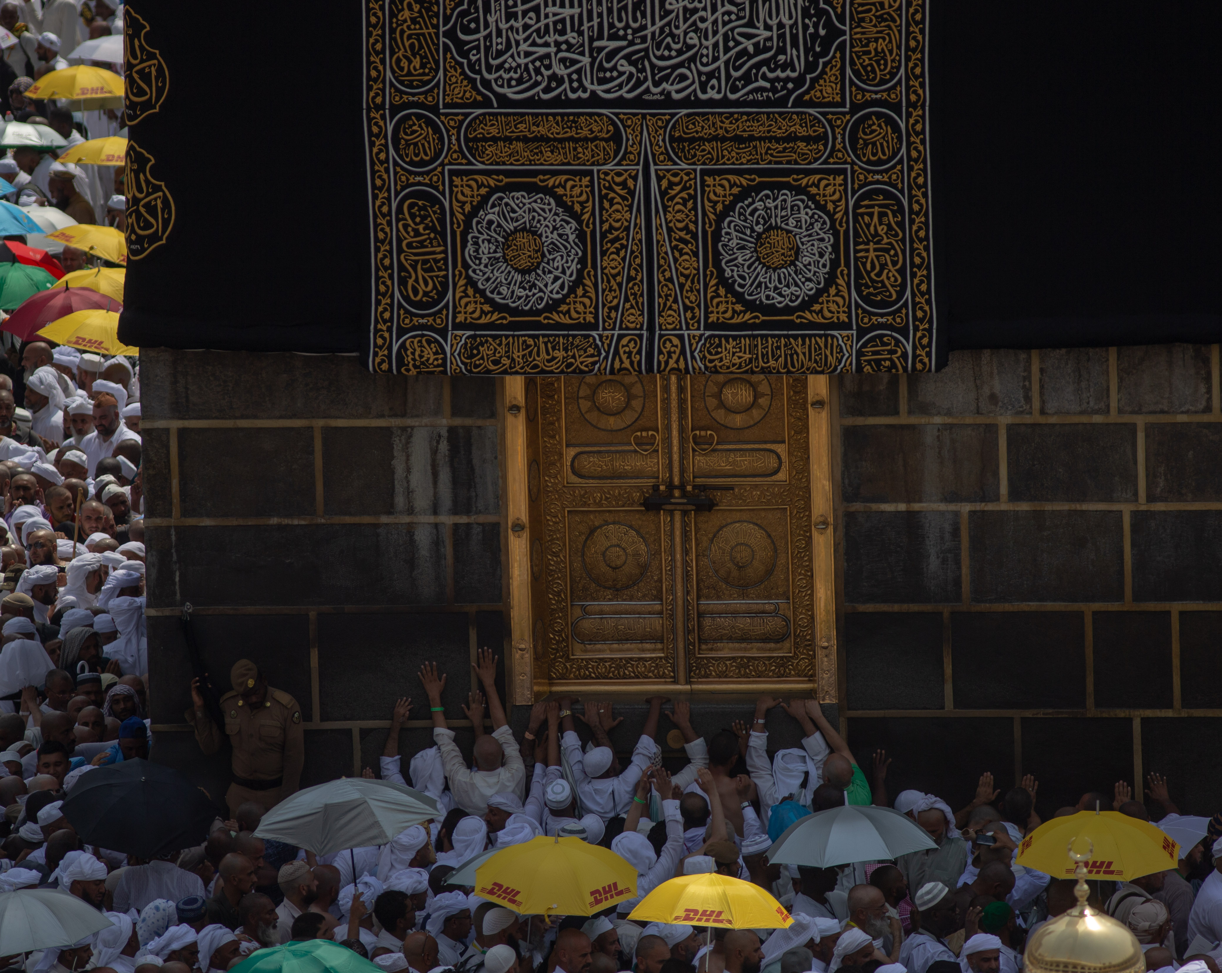 باب الكعبة